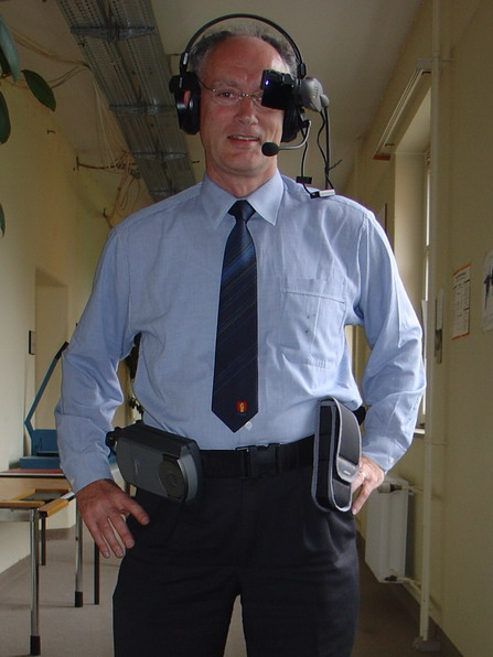 Benutzer Herbert Klaeren